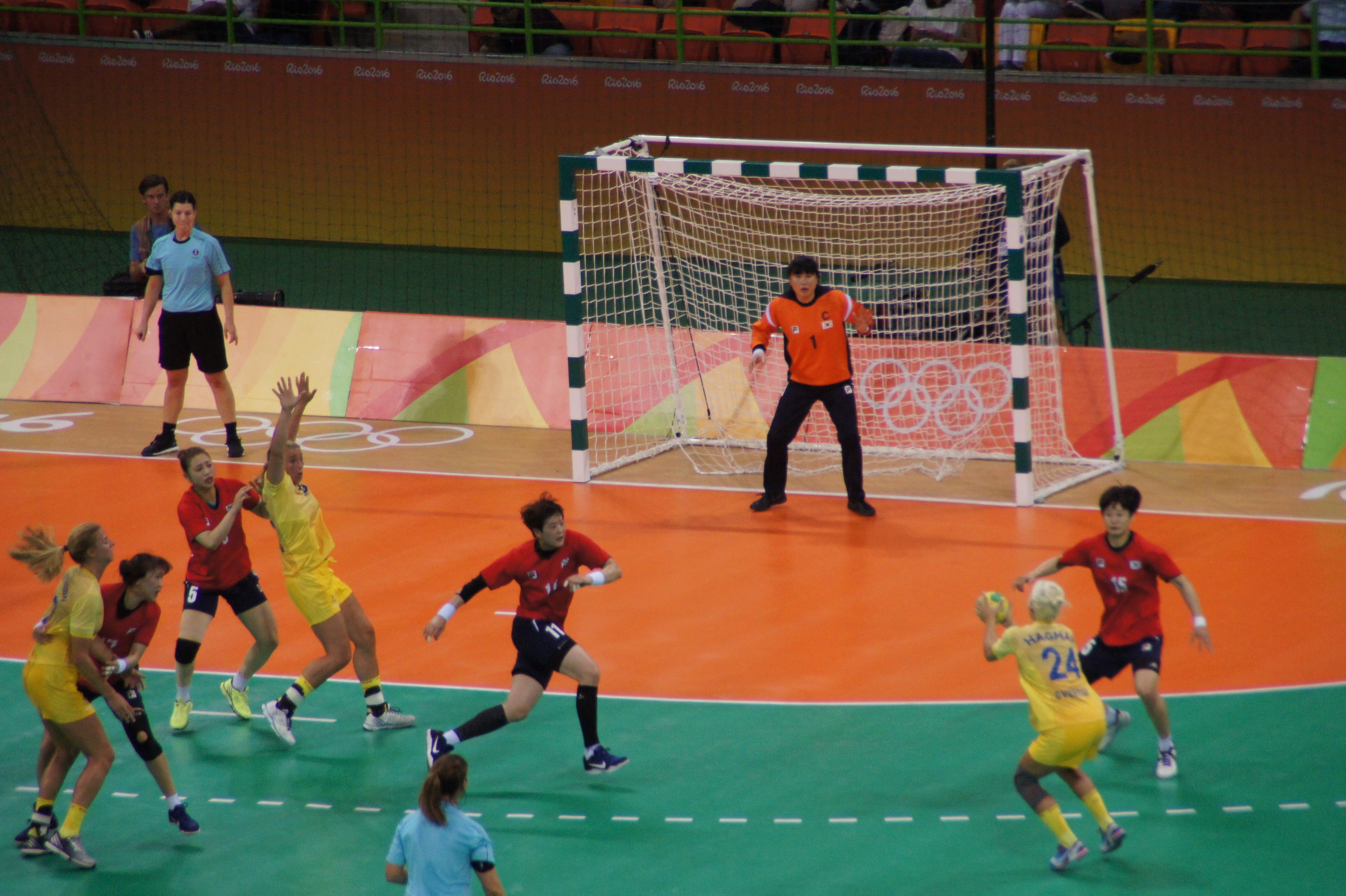 Rio 2016. a33 53